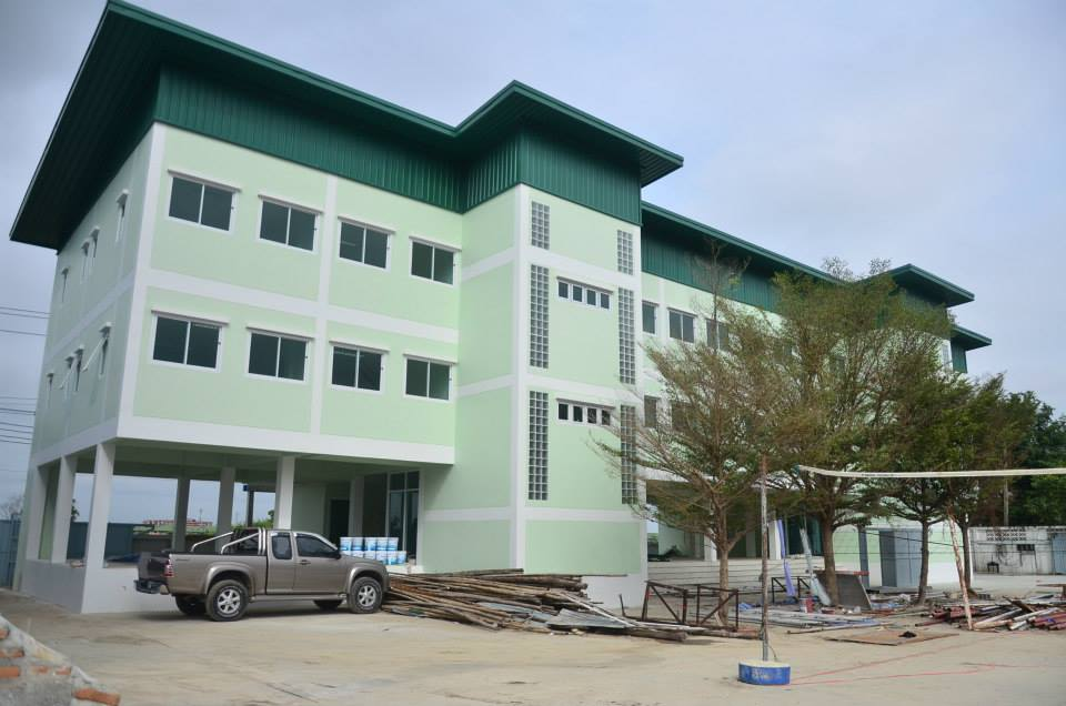 อาคารบ้านพักนักกีฬาโครงการช้างเผือก โรงเรียนสวนกุหลาบวิทยาลัย รังสิต